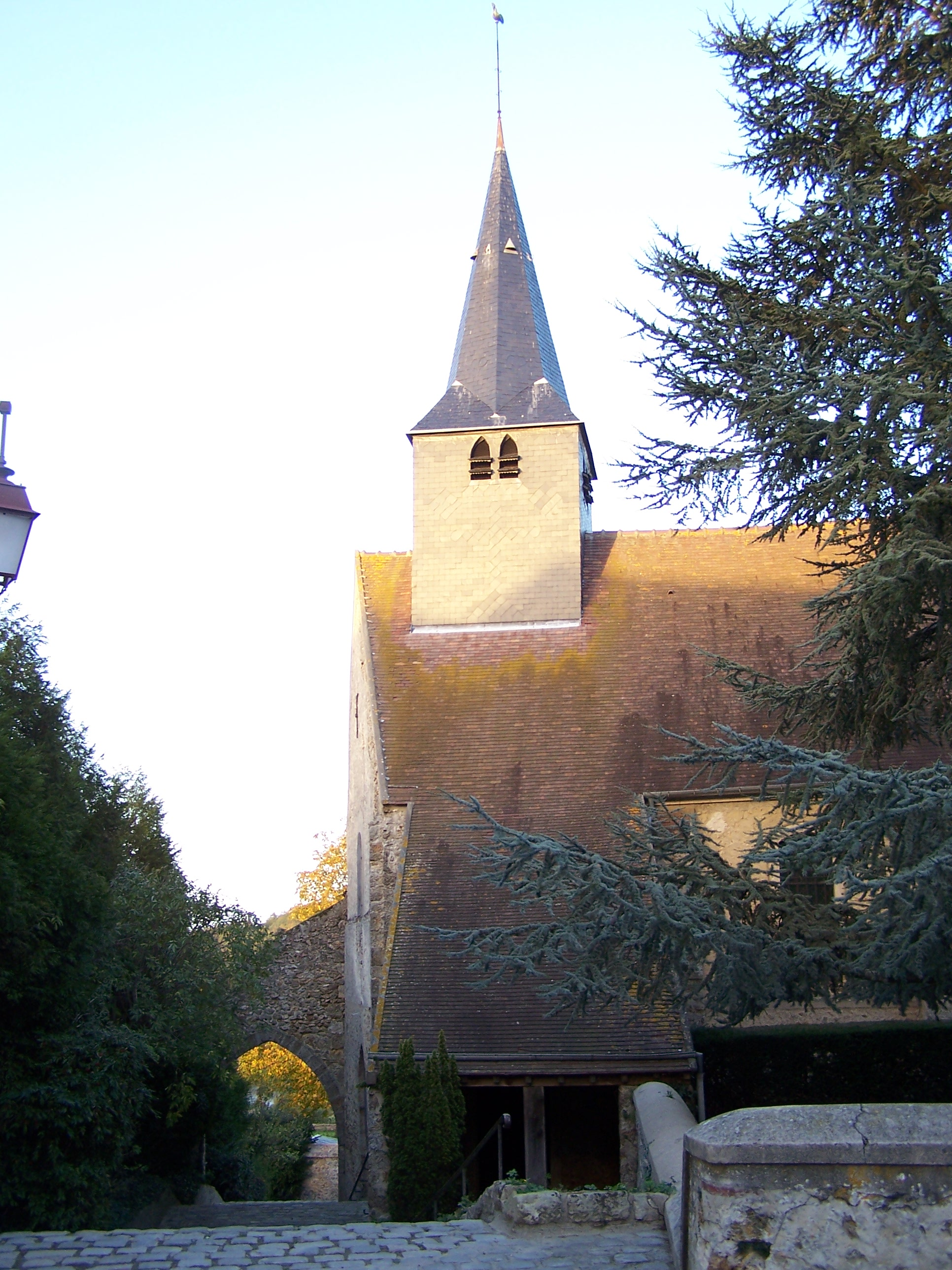 Église Saint-Sauveur à Maurepas (Yvelines, France)